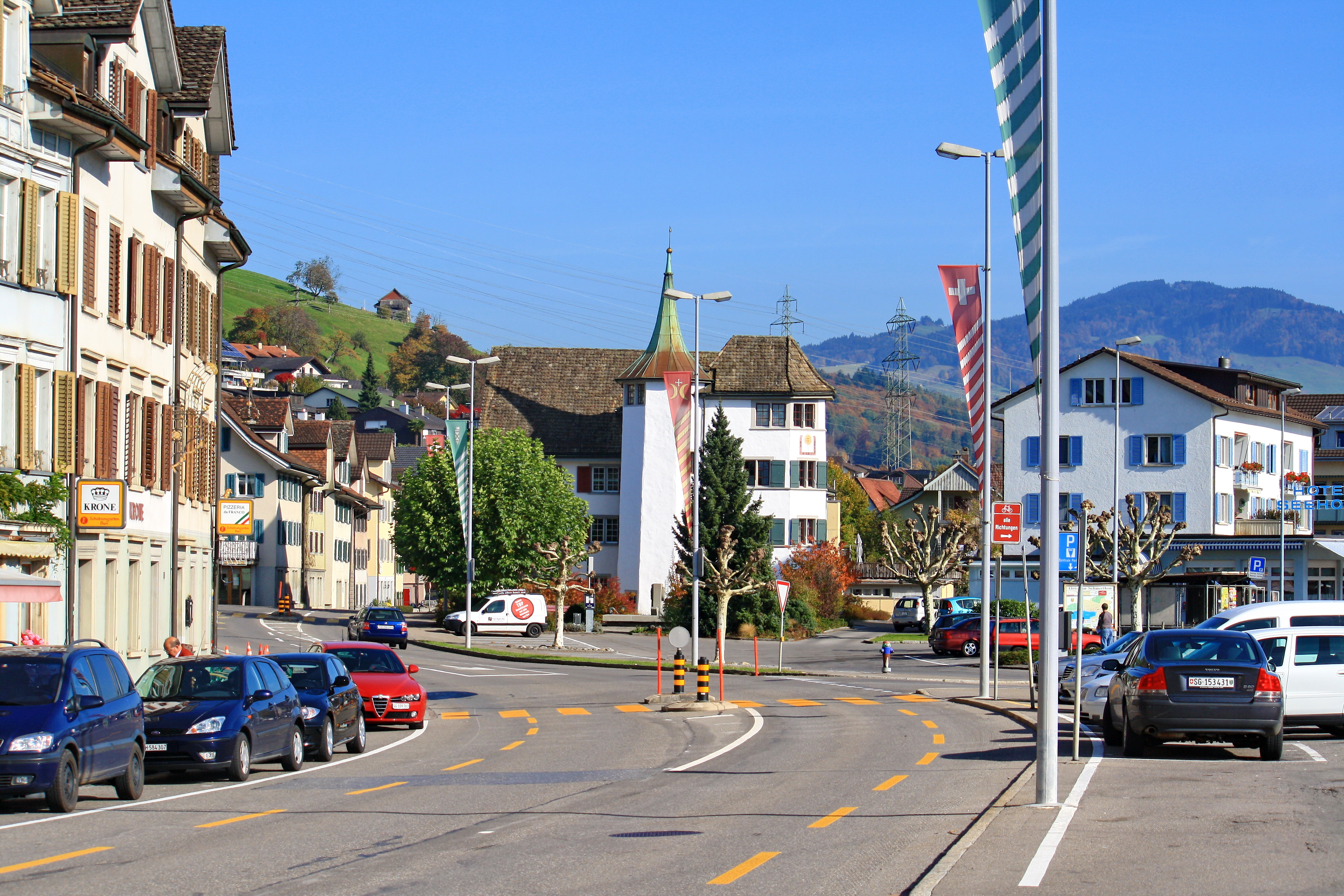 Hauptstrasse in Schmerikon on Obersee (upper Lake Zürich) shore